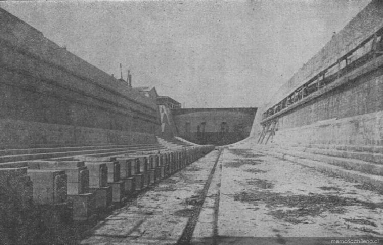 Dique seco de Talcahuano , inaugurado en el año de 1903